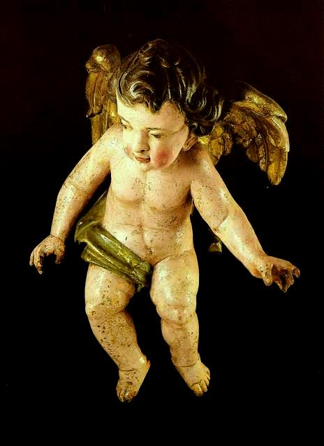 Mestre Valentim (1750-1813) - Anjo, século XVIII (madeira policromada, 65 cm de altura) - Proveniente da Igreja de São Pedro dos Clérigos, Rio de Janeiro. Acervo do Museu de Arte Sacra de São Paulo, Brasil.